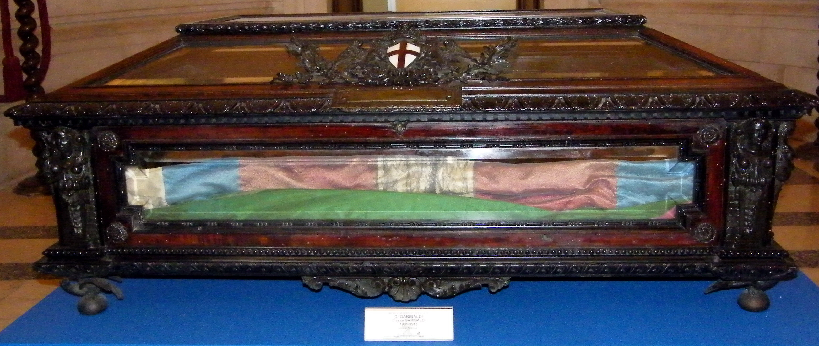 Bandiera di guerra dell'incrociatore corazzato Garibaldi